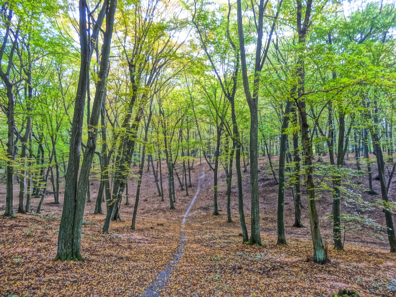 Las Rynkowski na terenie Leśnego Parku Kultury i Wypoczynku "Myślęcinek" w Bydgoszczy